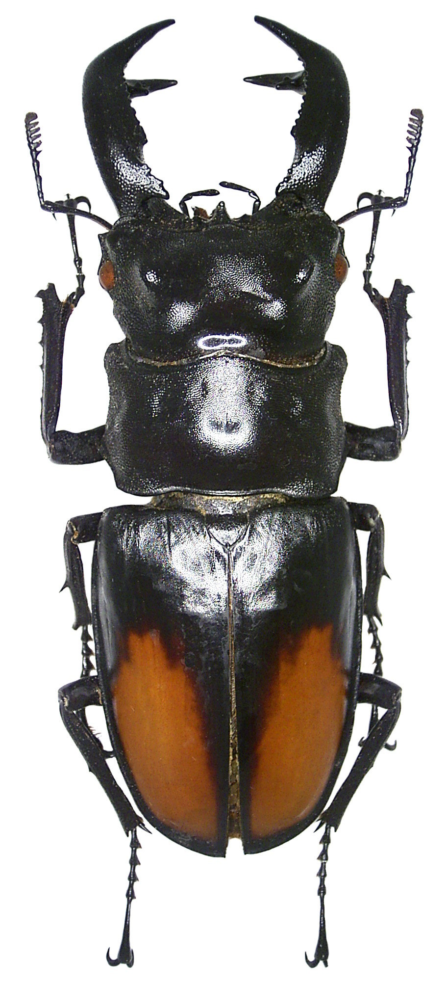 Familie: Lucanidae Groesse: 53-92 mm Verbreitung: Sumatra, Malaysia Fundort: Indonesien, Sumatra, 2006 det. A.Skale, 2006 Foto: U.Schmidt, 2007